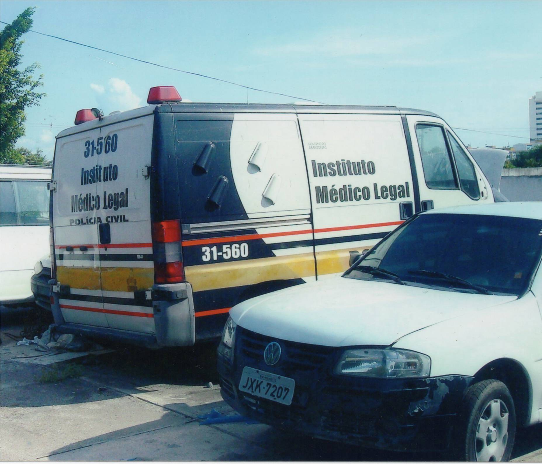 Viatura do Instituto Médico Legal da Polícia Civil do Estado do Amazonas